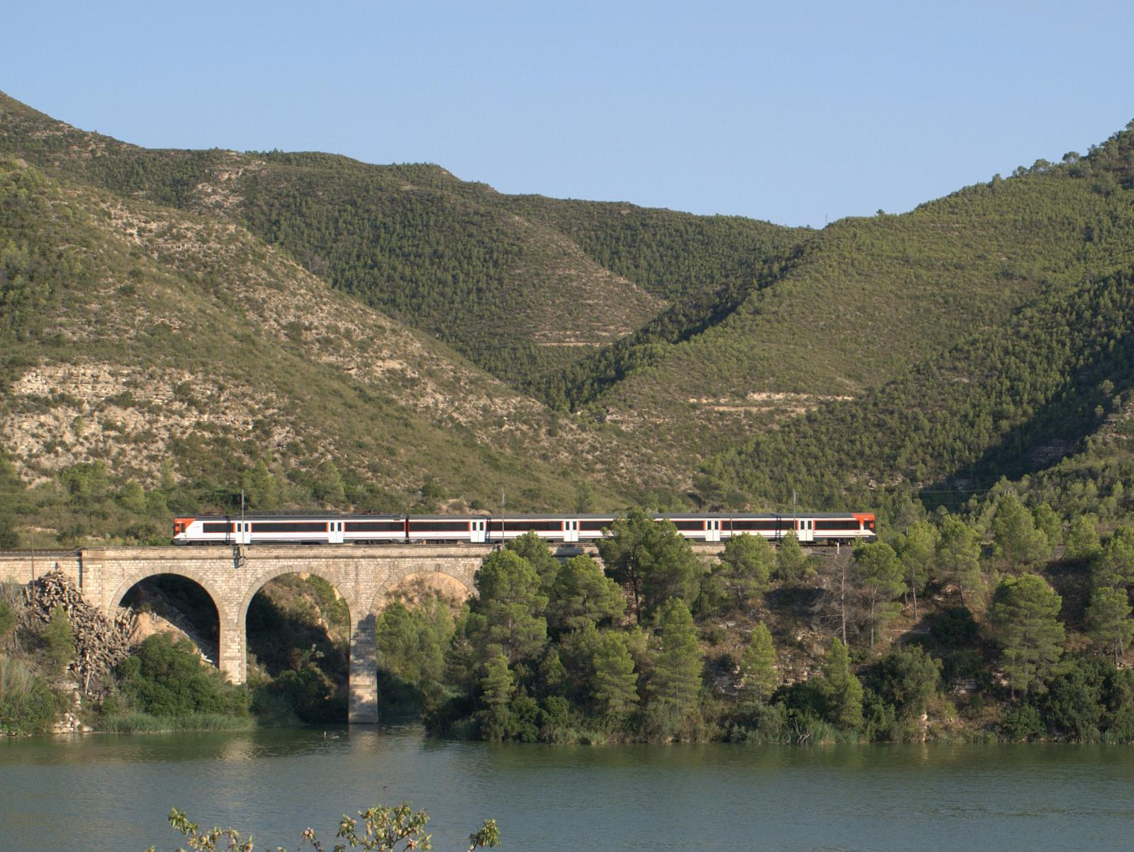 Bcn-Zaragoza vía Caspe en La Pobla de Massaluca, visto desde Fayón.